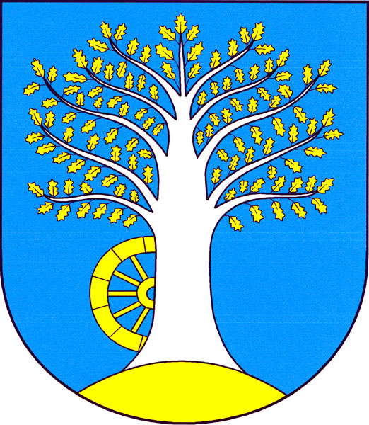 Znak obce Rádlo